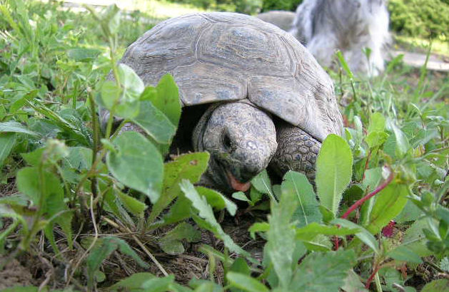 Testudo graeca, Lombardia, Italia